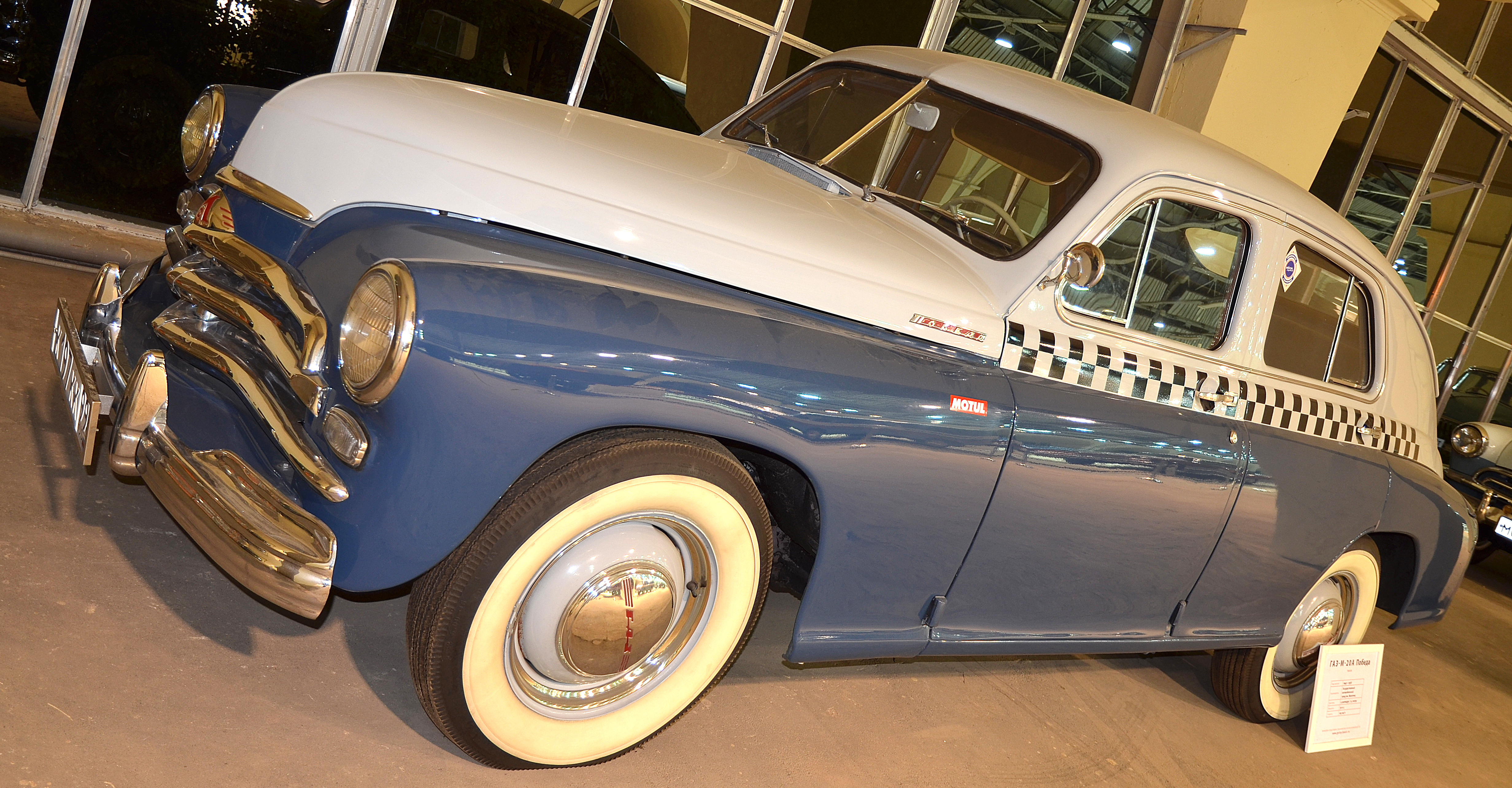 Можно увидеть здесь : You can see here